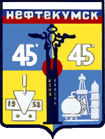 Герб Нефтекумска Ставропольского края,Россия